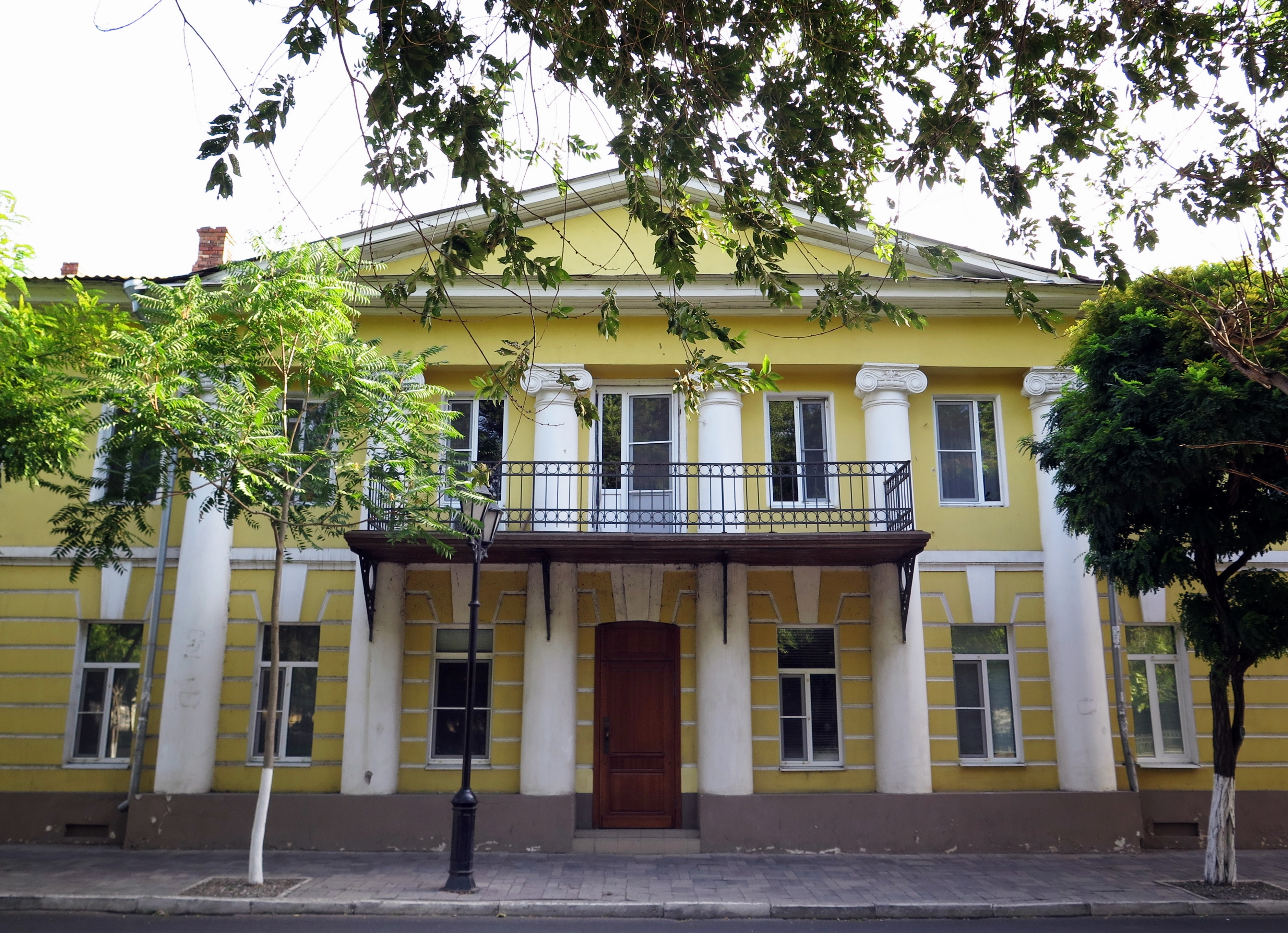 Здание полицейского управления (суд земский и уездный): улица Советская, 32 / улица Михаила Аладьина, 11 / переулок Советский, 2 (А), Астрахань, Астраханская область